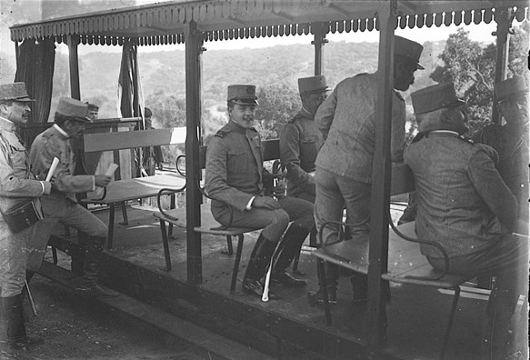 Dom Manuel II, fardado, viaja no tramway a tracção muar com outros oficiais no âmbito de exercícios militares na Base de Tancos.